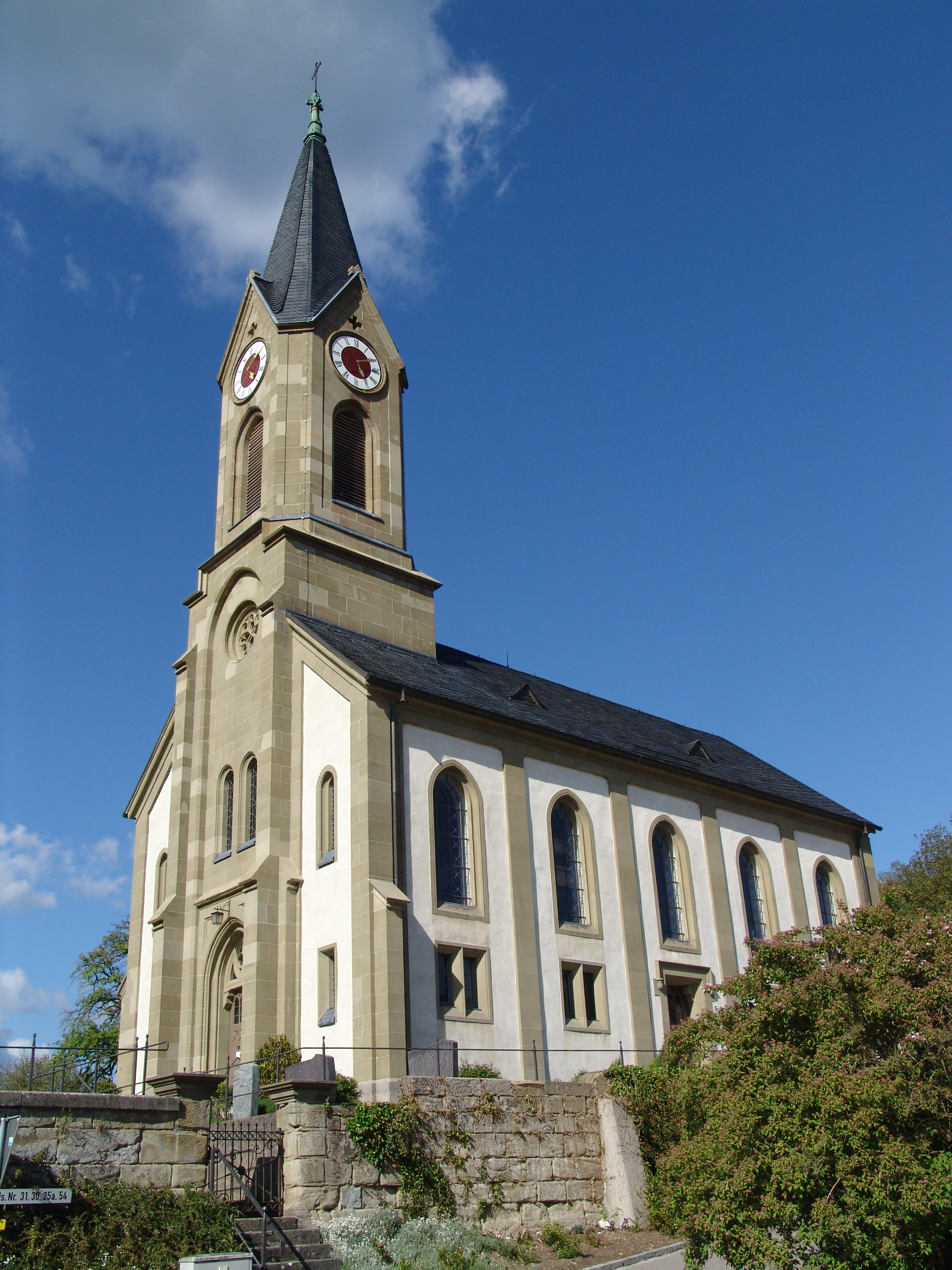 evang.-luth Kirche St. Nikolaus in Bockenfeld